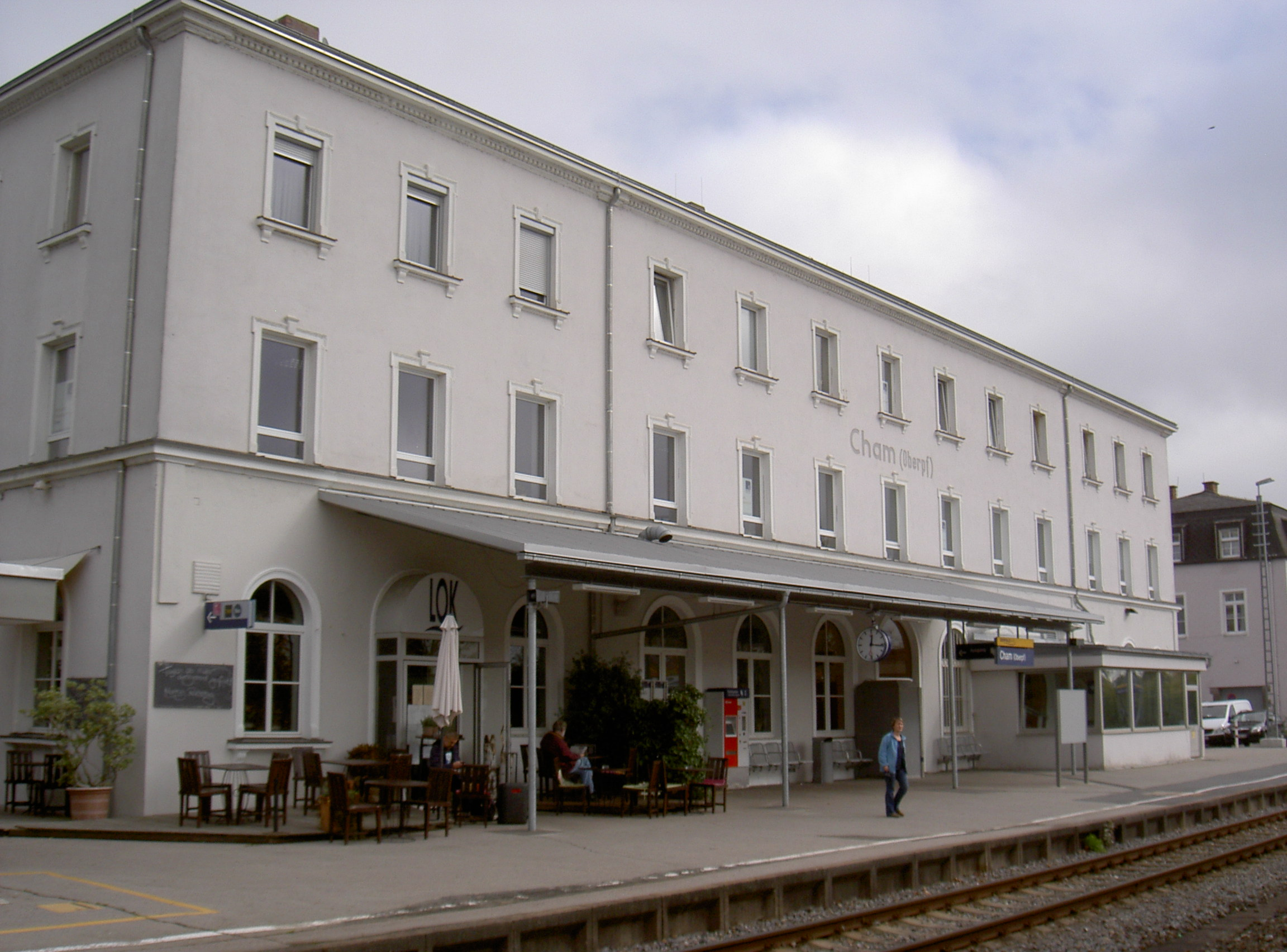 Bahnhof Cham (Oberpfalz)